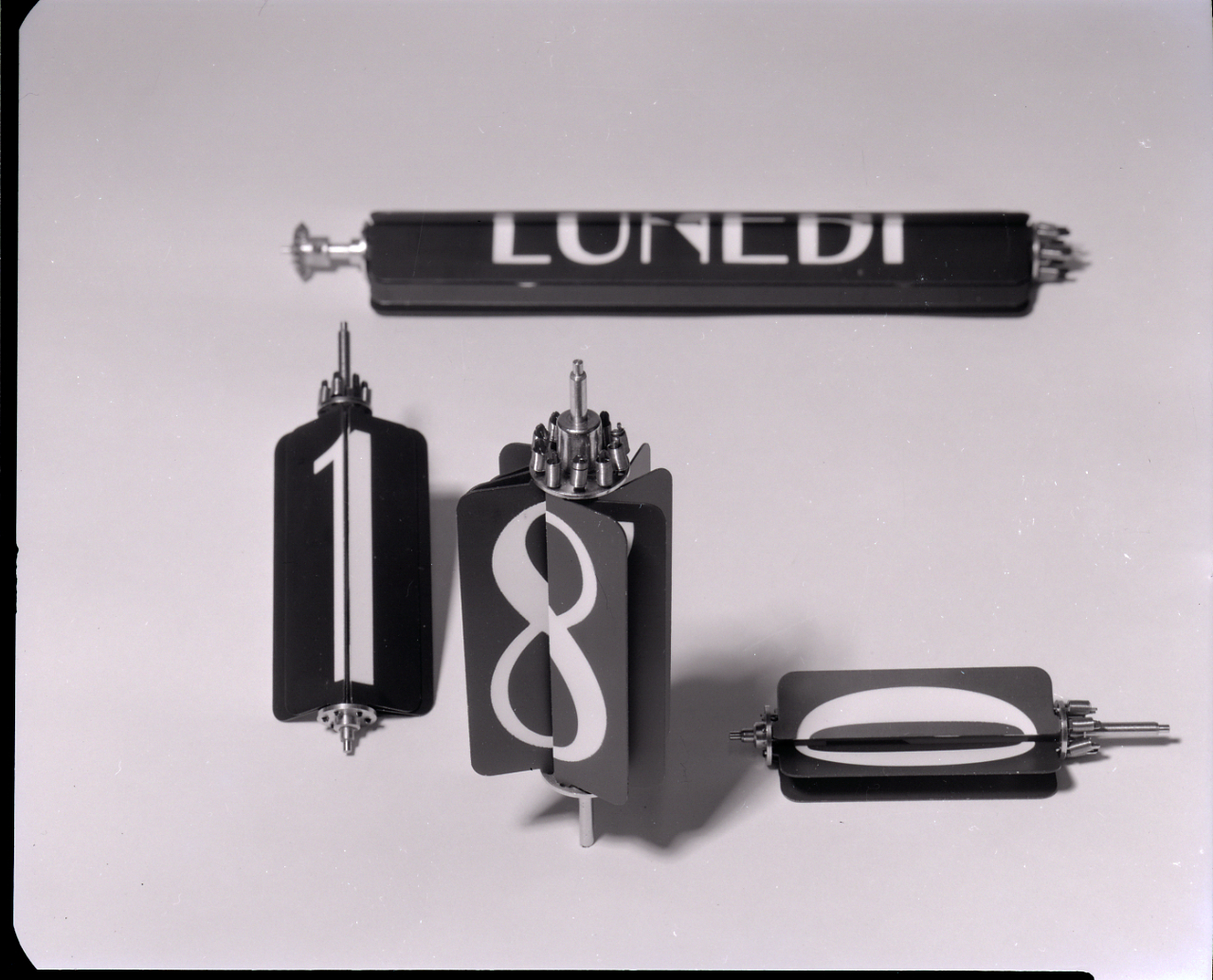 Servizio fotografico : Italia, 1965 / Paolo Monti. - Buste: 7, Fototipi: 7 : Negativo b/n, gelatina bromuro d'argento/ pellicola ; 10x12. - ((Serie costituita da 7 buste di negativi identificati con i nn.: 19790, 19791, 19792, 19793, 19794, 19795, 19796, e tenute insieme da una graffetta. - Sul coperchio della scatola iscrizione didascalica manoscritta a pennarello nero: "Radar - Orologi/ solari".